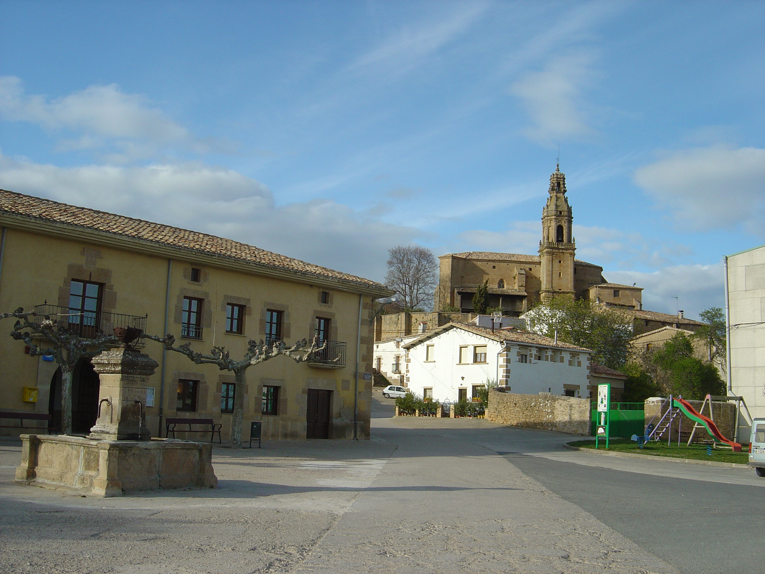 Arellano. Navarra. Spanien.